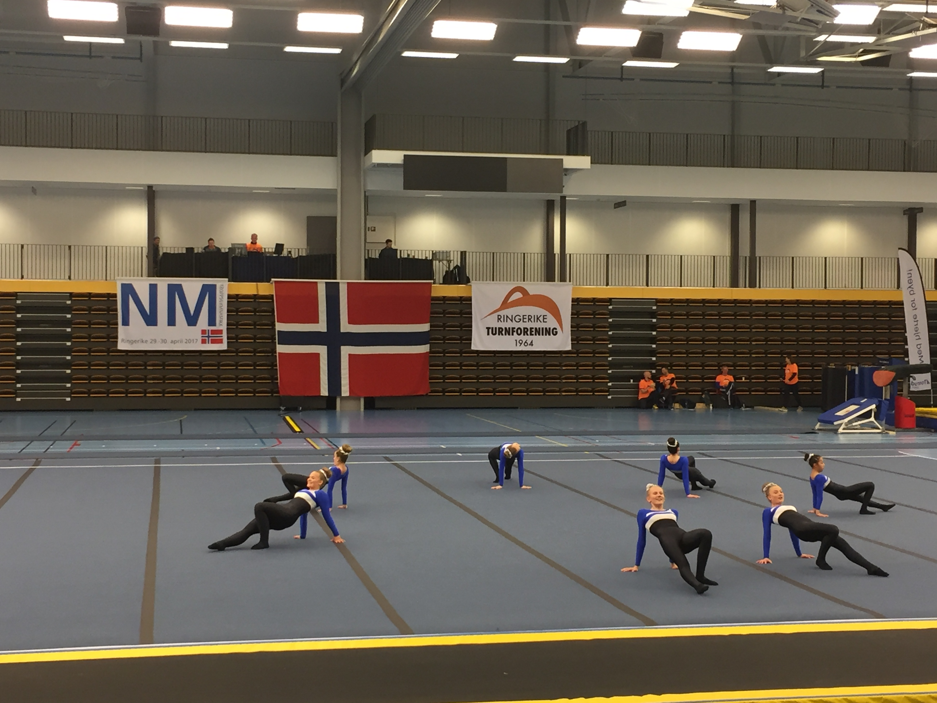 Junior-NM troppsturn 2017 Ringerike - IL ROS frittstående